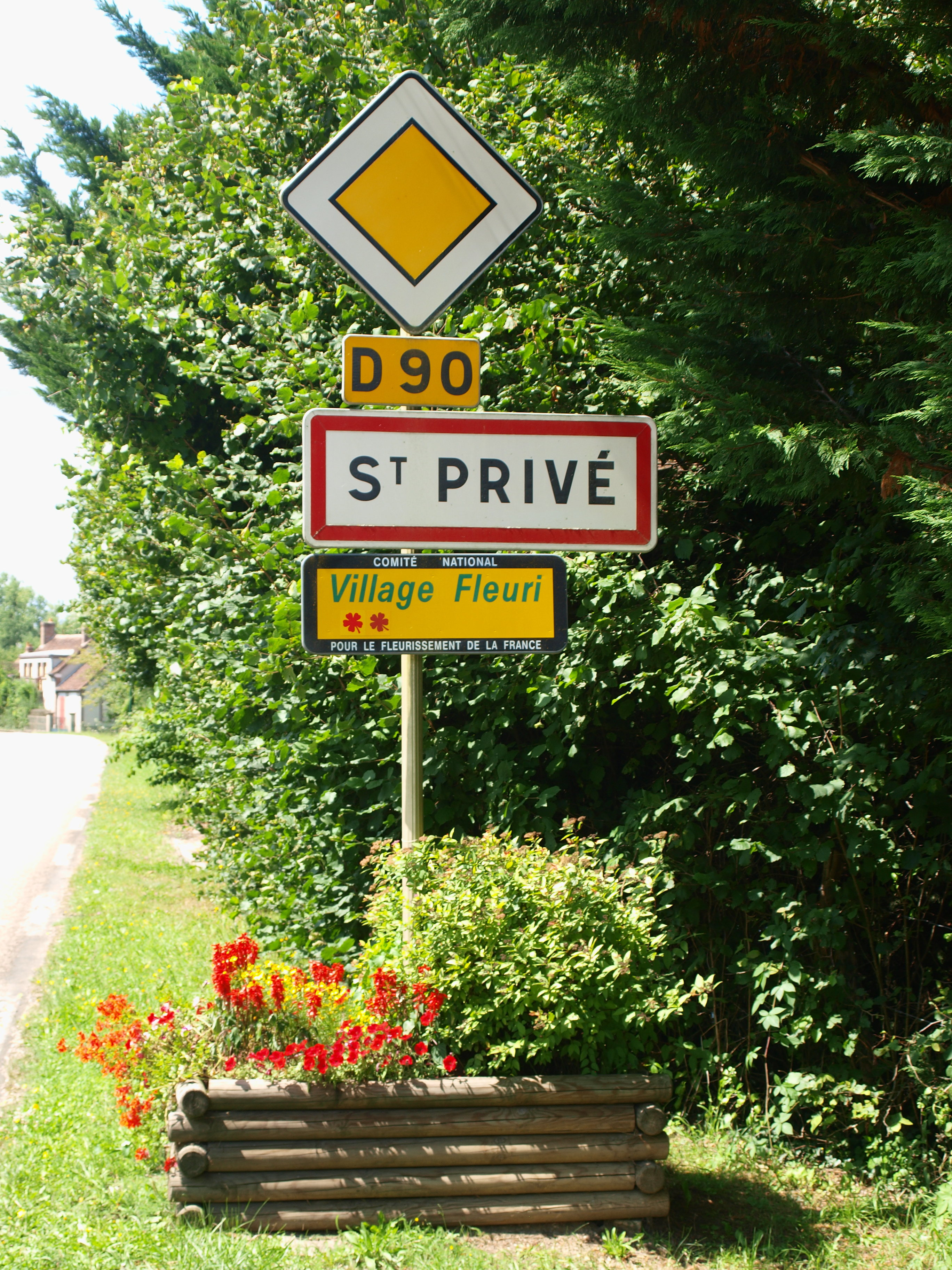 Saint-Privé (Yonne, France) , panneau d'agglomération